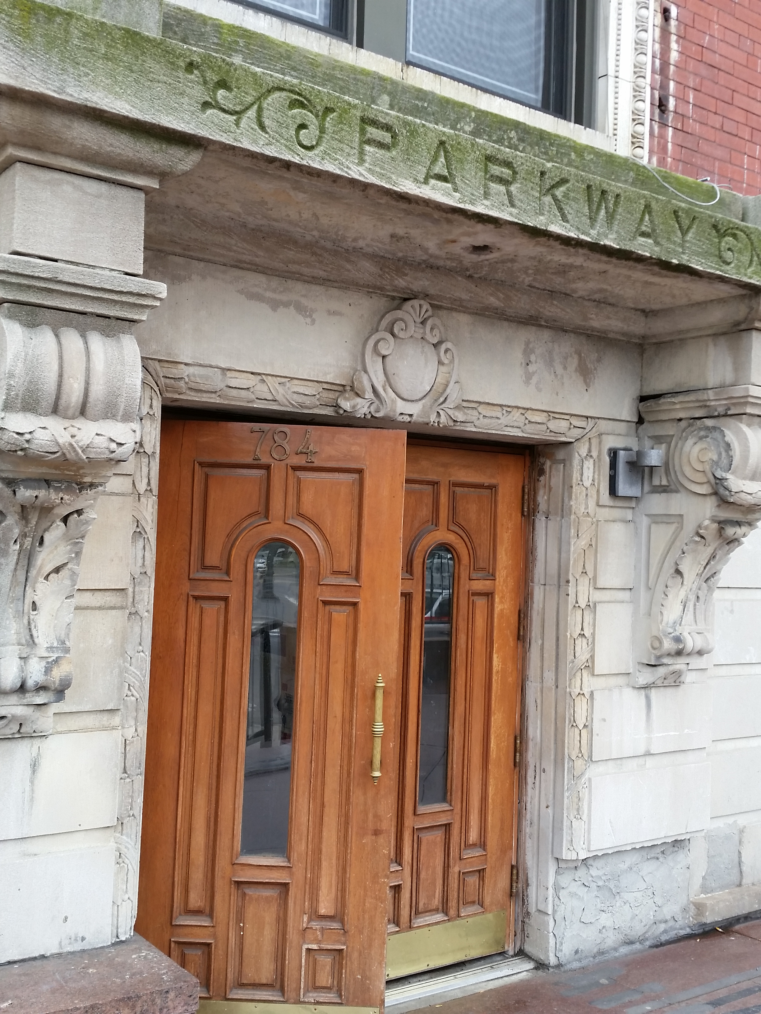 דלת הכניסה הראשית לבניין 788